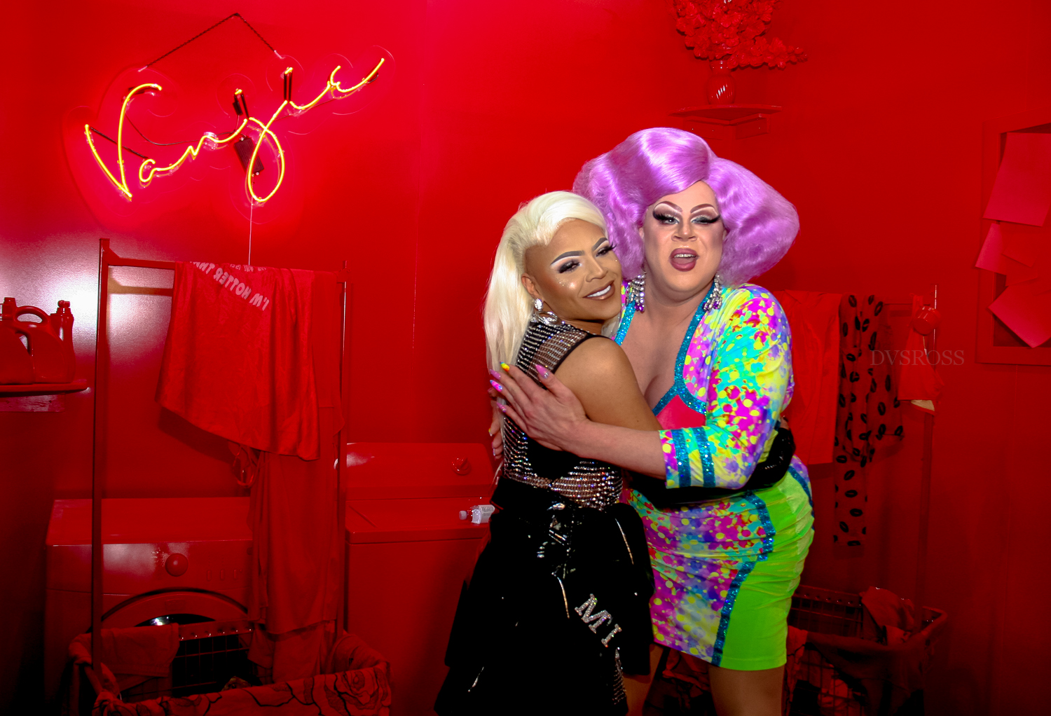 Rupaul's DragCon 2019